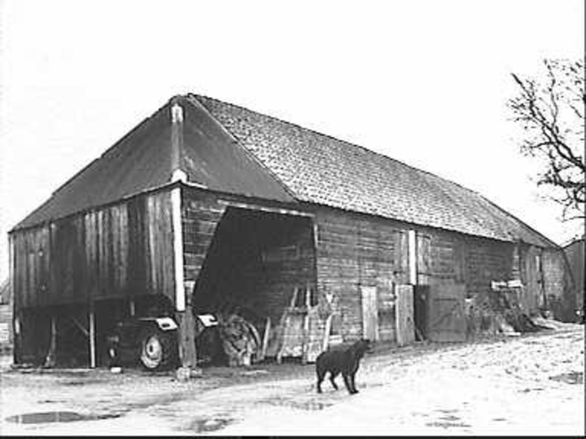 Wieringen/ Schuur: kop- en zijgevel (opmerking: Deze afbeelding hebben wij helaas alleen in deze lage resolutie.)